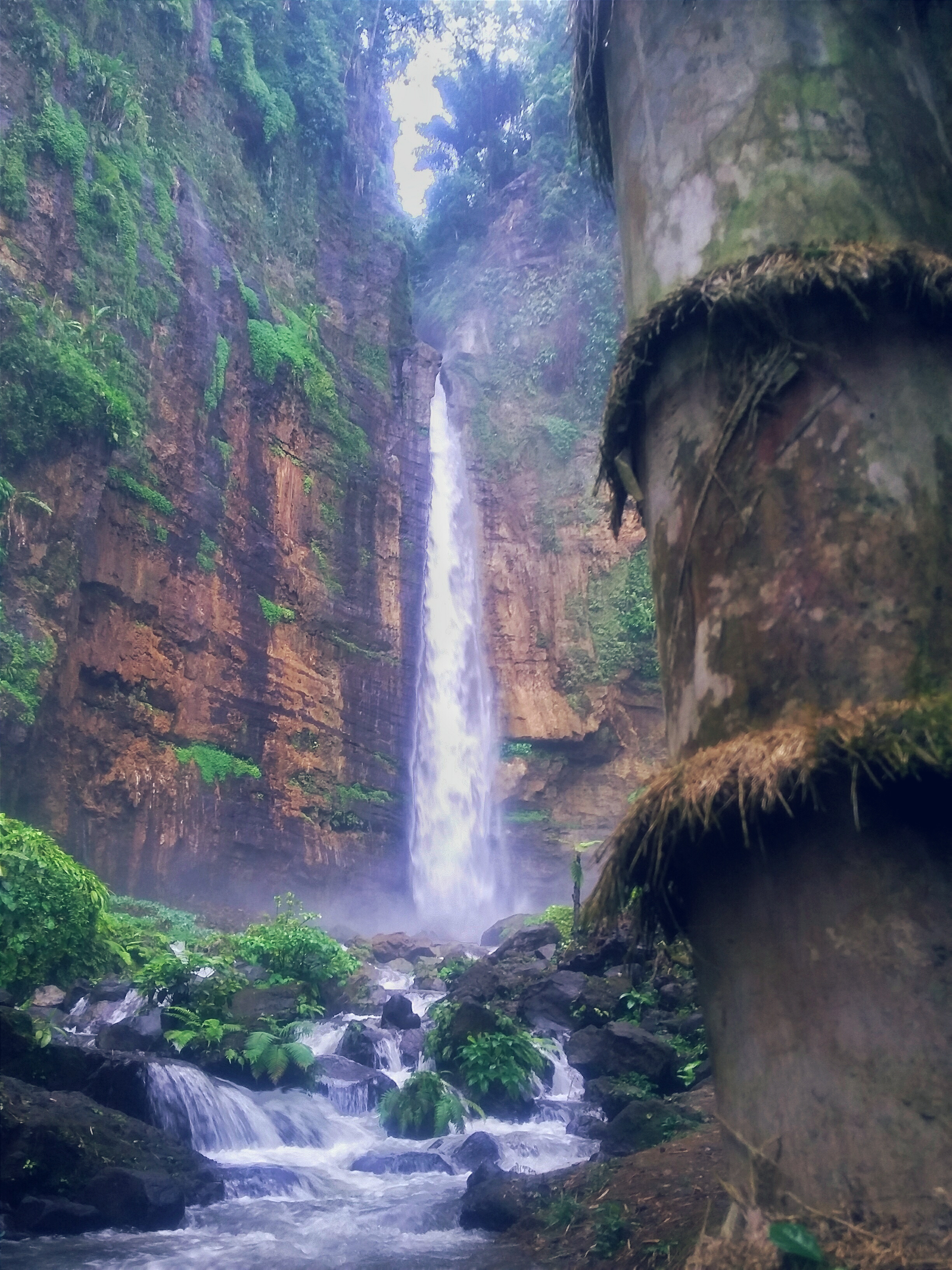 Terlihat begitu unik, keindahan air terjun di lereng semeru dengan keberadaan tebing-tebing yang unik membuat wujud yang khas.